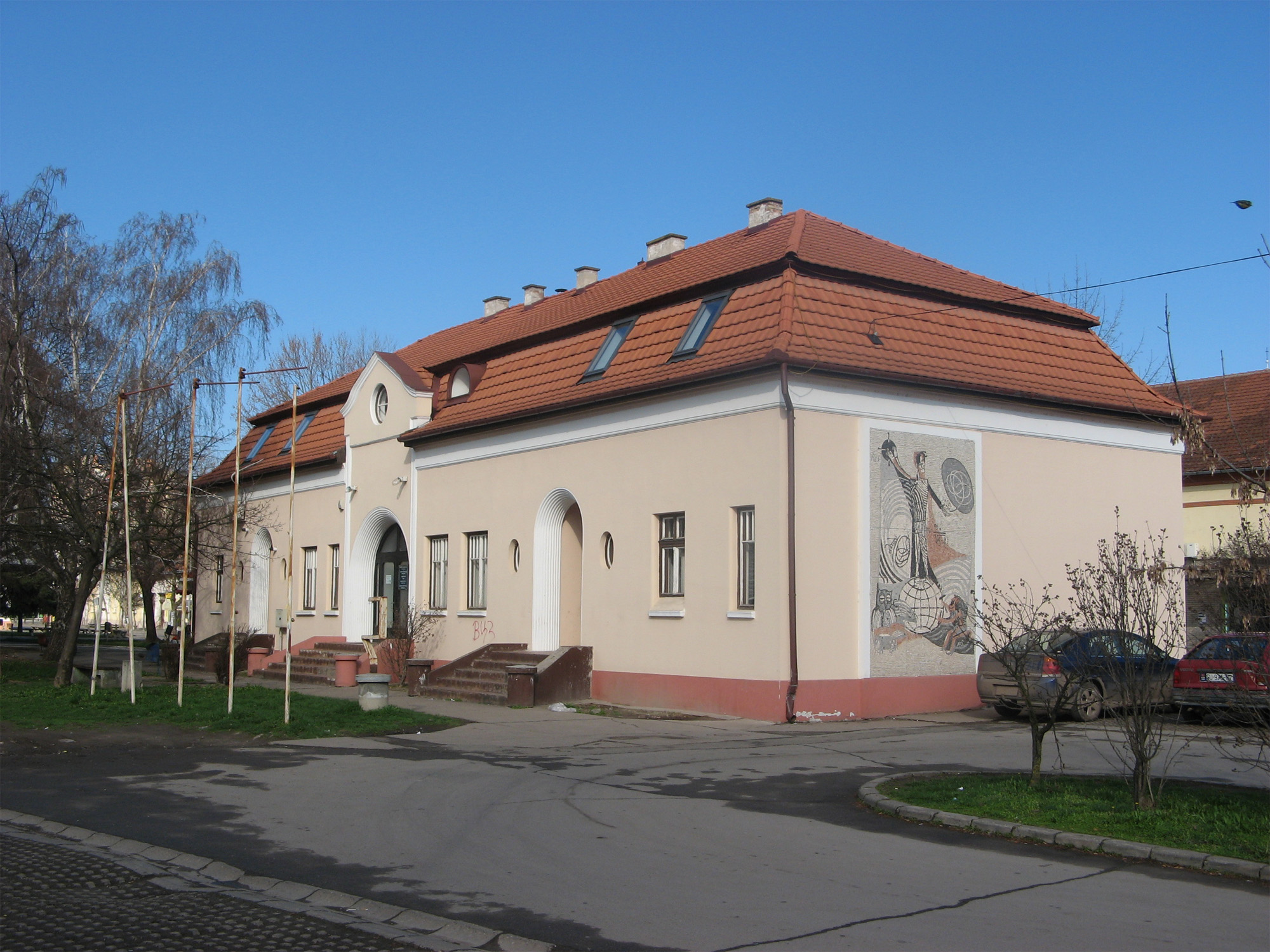 Népkönyvtár - Topolya